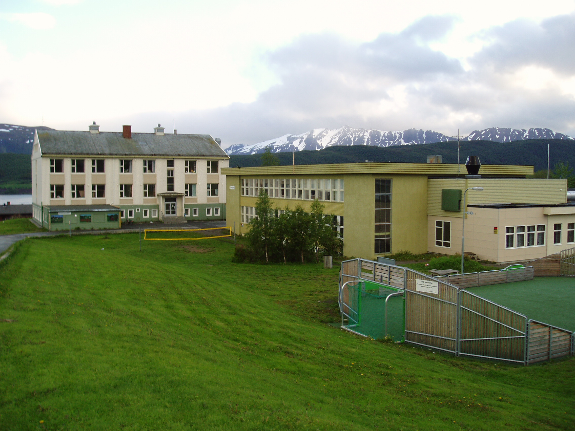 Borkenes skole, Kvæfjord kommune. Barneskolen til venstre, ungdomsskolens gamle del i midten og nyrestaurerte del til høyre.